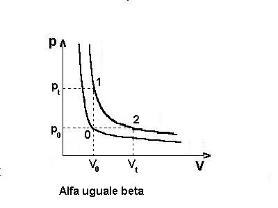 Rappresentazione grafica di come alfa della 1° Legge di Gay-Lussac sia uguale a beta della 2° Legge di Gay-Lussac (libro di chimica-fisica)